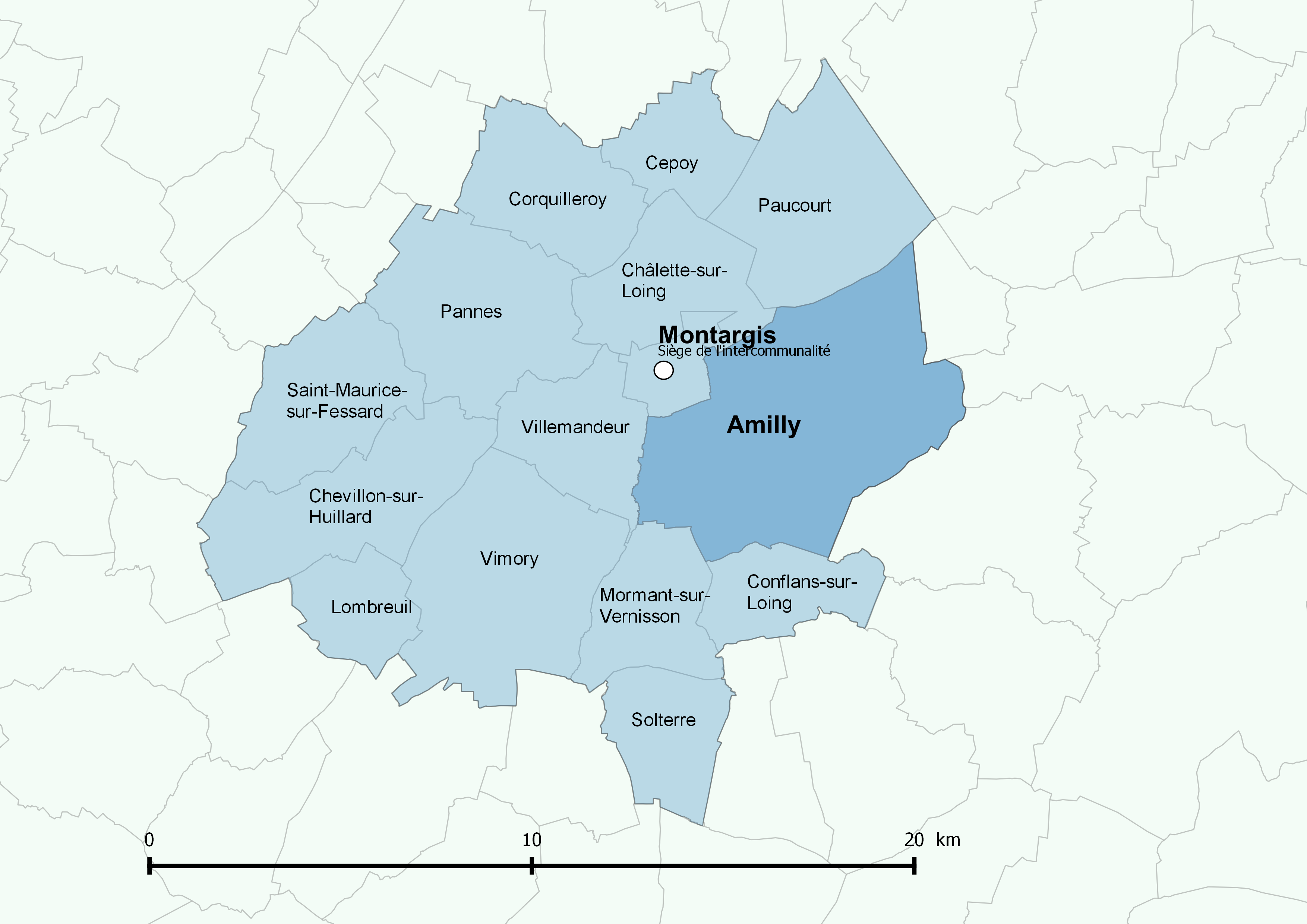 Périmètre de l'Agglomération montargoise et rives du Loing - Positionnement de la commune d'Amilly